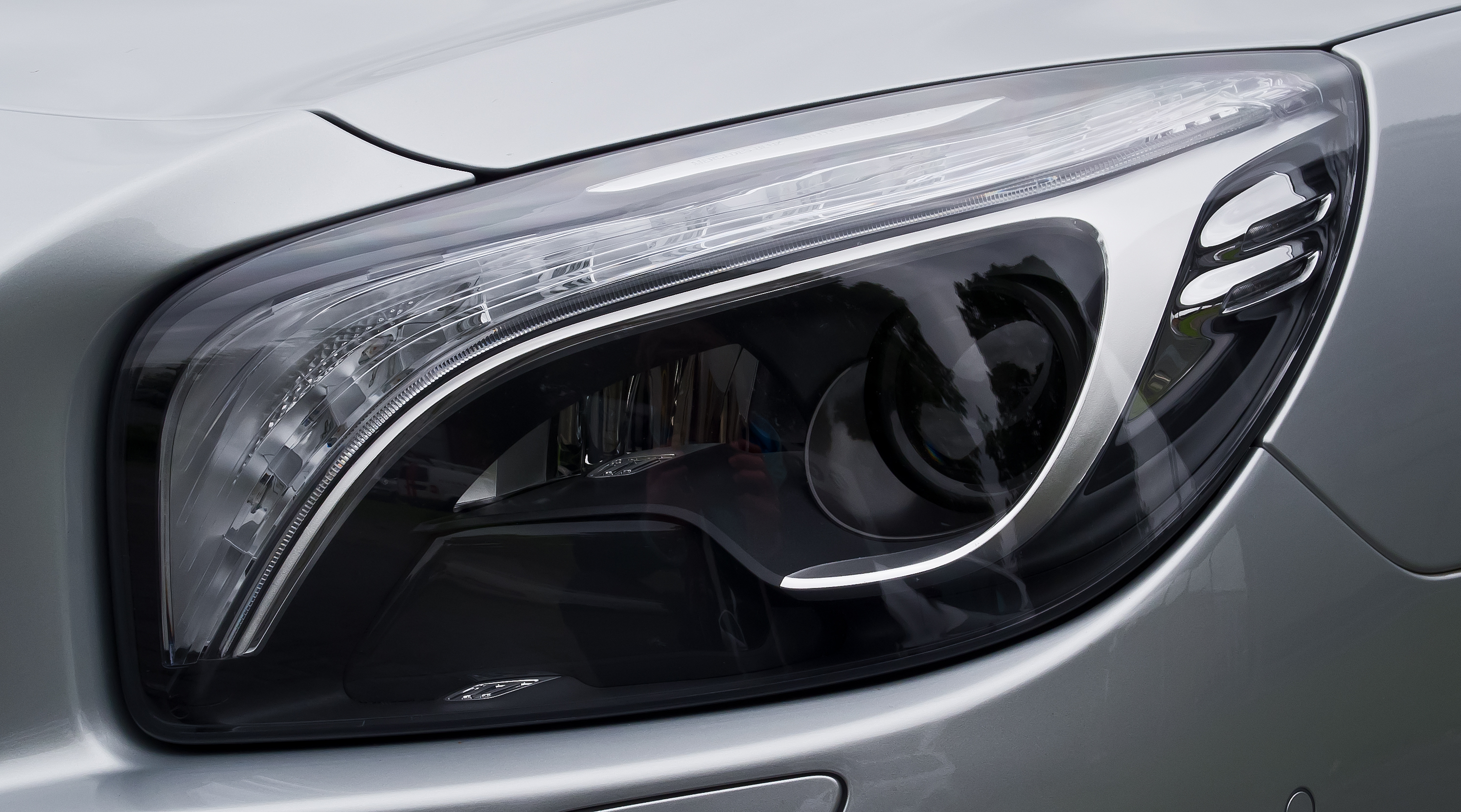 Mercedes-Benz SL 350 (R 231)